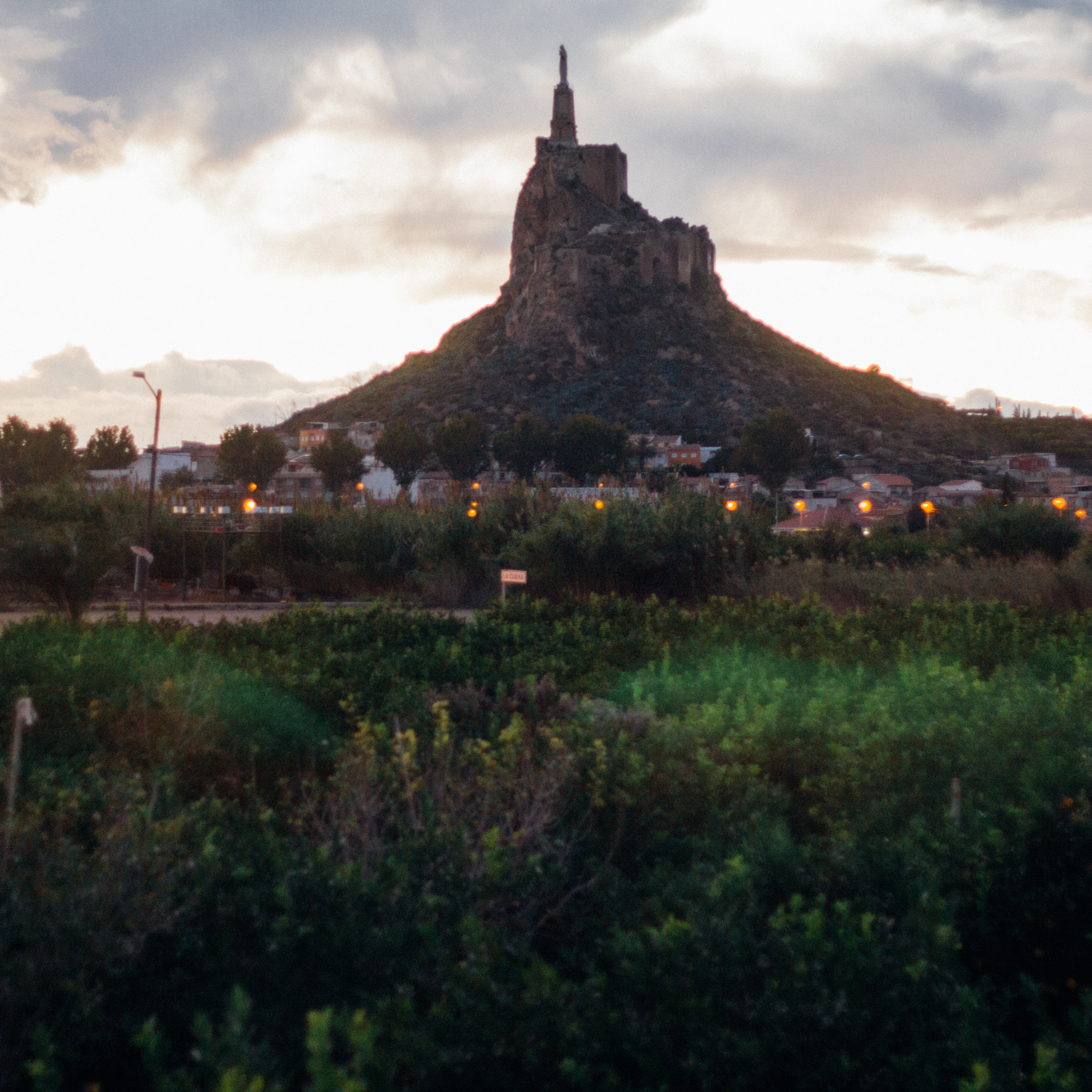 Atardecer en Murcia, con la huerta y el Cristo de Monteagudo de fondo.